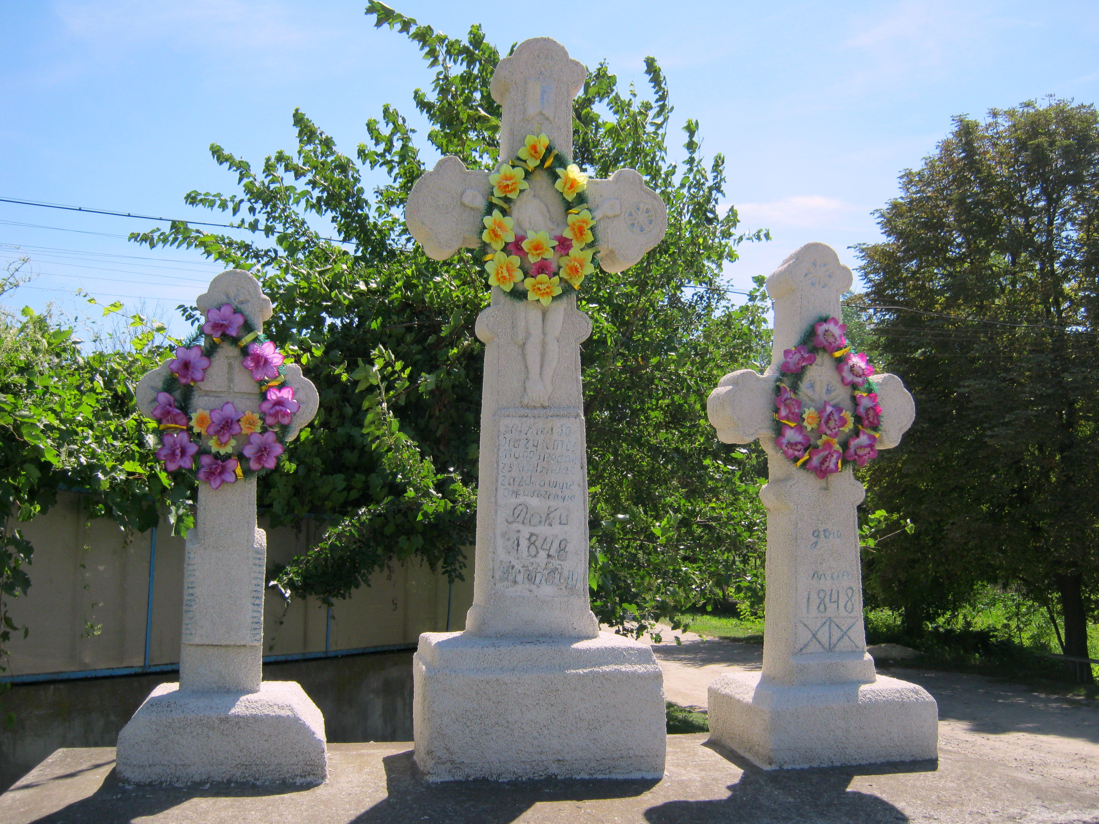 Пам'ятні хрести на честь скасування панщини у селі Устя Борщівського району Тернопільської області